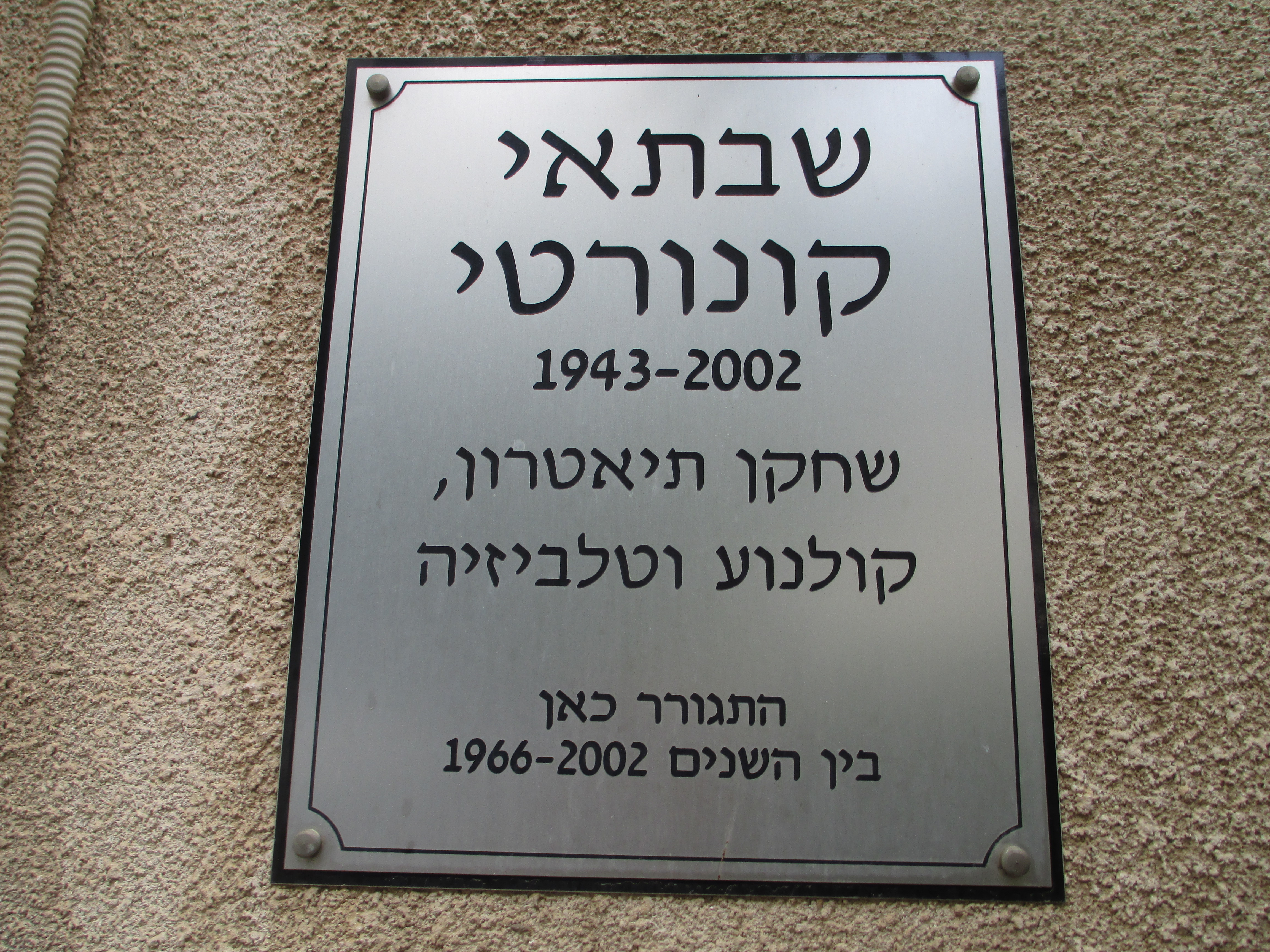 לוחית זיכרון לשחקן שבתאי קונורטי ברח' אהרונוביץ' 3 בתל אביב